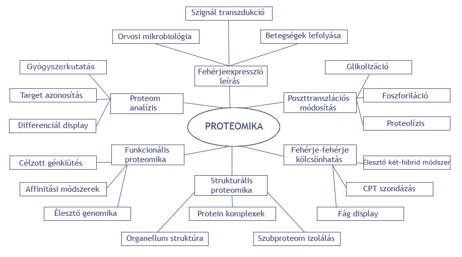 PM-2